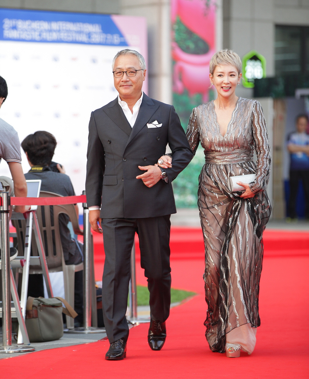 2017 부천국제판타스틱영화제(BIFAN) 레드카펫. 왼쪽 이경영, 오른쪽 이상아